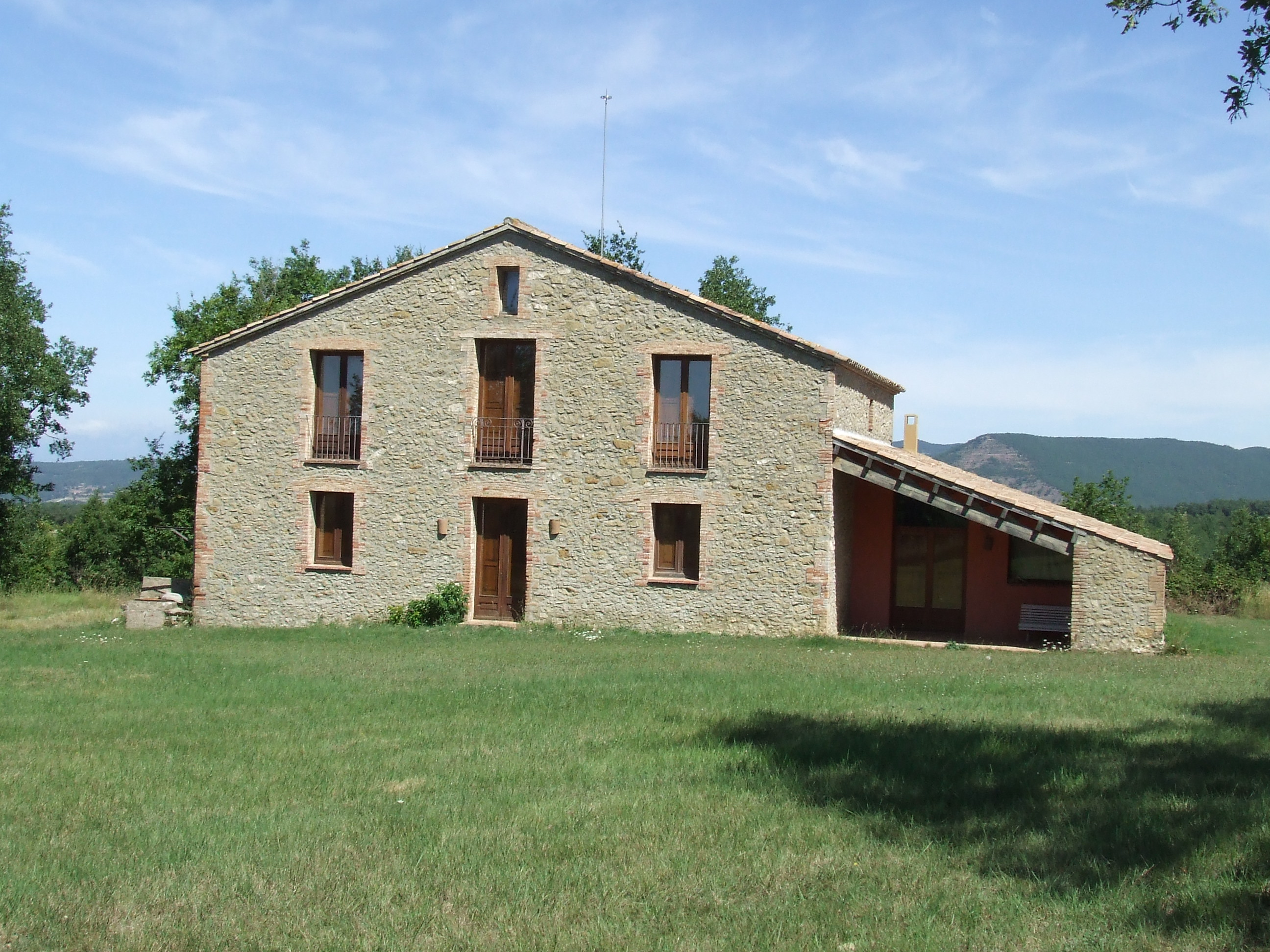 Sant Jeroni (Castellcir, Moianès)